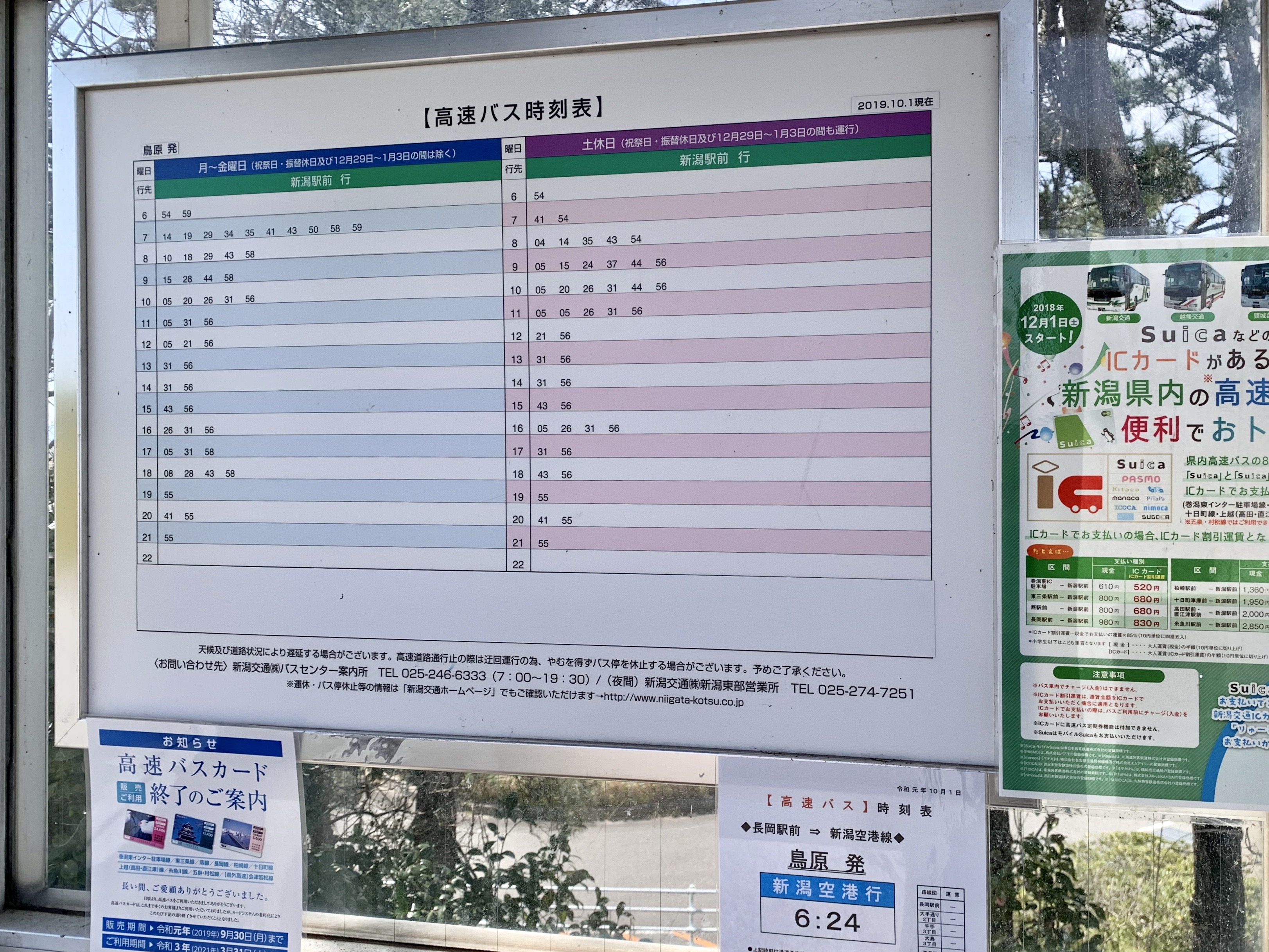 北陸自動車道・鳥原バスストップ 時刻表（2020年3月）